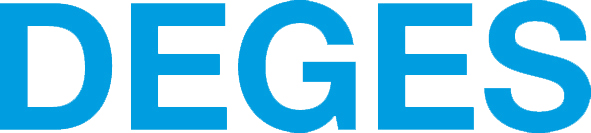 Firmenlogo